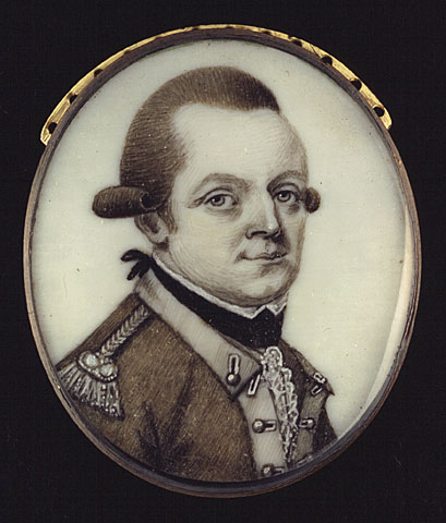 Title / Titre :Colonel Christian Daniel Claus Creator(s) / Créateur(s) : Unknown Date(s) : ca. 1770s Reference No. / Numéro de référence : MIKAN 2894484 / C-083514 Credit / Mention de source : Library and Archives Canada, C-083514 / Bibliothèque et Archives Canada, C-083514 Description / Descriptions : Christian Daniel Claus (1717-1787) was a German immigrant who became familiar with the customs and language of the Mohawk Indians during his first years in North America. Under William Johnson he became a lieutenant in the British Indian Department in 1755 and moved to Montreal when he was made the Deputy Agent to the Canadian Indians in 1760. He returned to the Hudson Valley but then fled to Canada in 1777 during the American Revolution. He helped settle loyal Six Nations Indians in Ontario at the Bay of Quinte after the war. He later died in Britain seeking compensation for his earlier losses. / Christian Daniel Claus (1717-1787) était un immigrant allemand qui se familiarisa avec les coutumes et la langue des Mohawks durant ses premières années en Amérique du Nord. Sous les ordres de William Johnson, il devint lieutenant à l'Indian Department britannique en 1755 et partit pour Montréal en tant qu’agent adjoint chargé des Indiens du Canada en 1760. Il retourna dans la vallée de l'Hudson, puis s'enfuit au Canada en 1777 durant la Révolution américaine. Après la guerre, il aida les Indiens loyalistes de la ligue des Six-Nations à s'établir en Ontario, à la baie de Quinte. Il mourut par la suite en Grande-Bretagne, où il avait demandé d’être indemnisé des pertes subies pendant la Révolution.